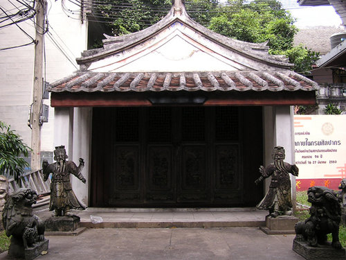 เก๋งนุกิจราชบริหาร ภายในพระราชวังบวรสถานมงคลหรือพิพิธภัณฑสถานแห่งชาติ พระนครในปัจจุบัน